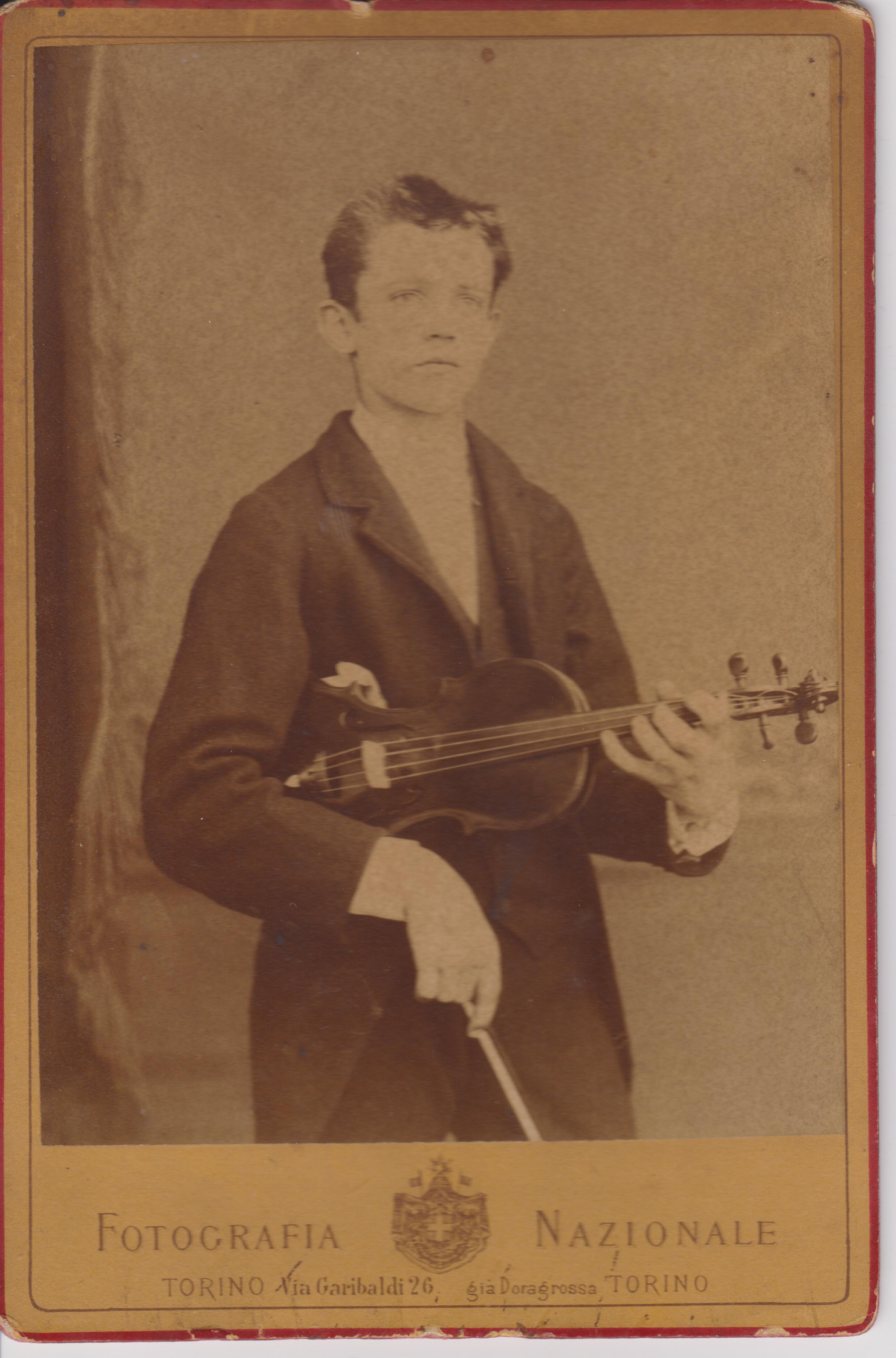 Rosario Scalero durante gli studi di violino